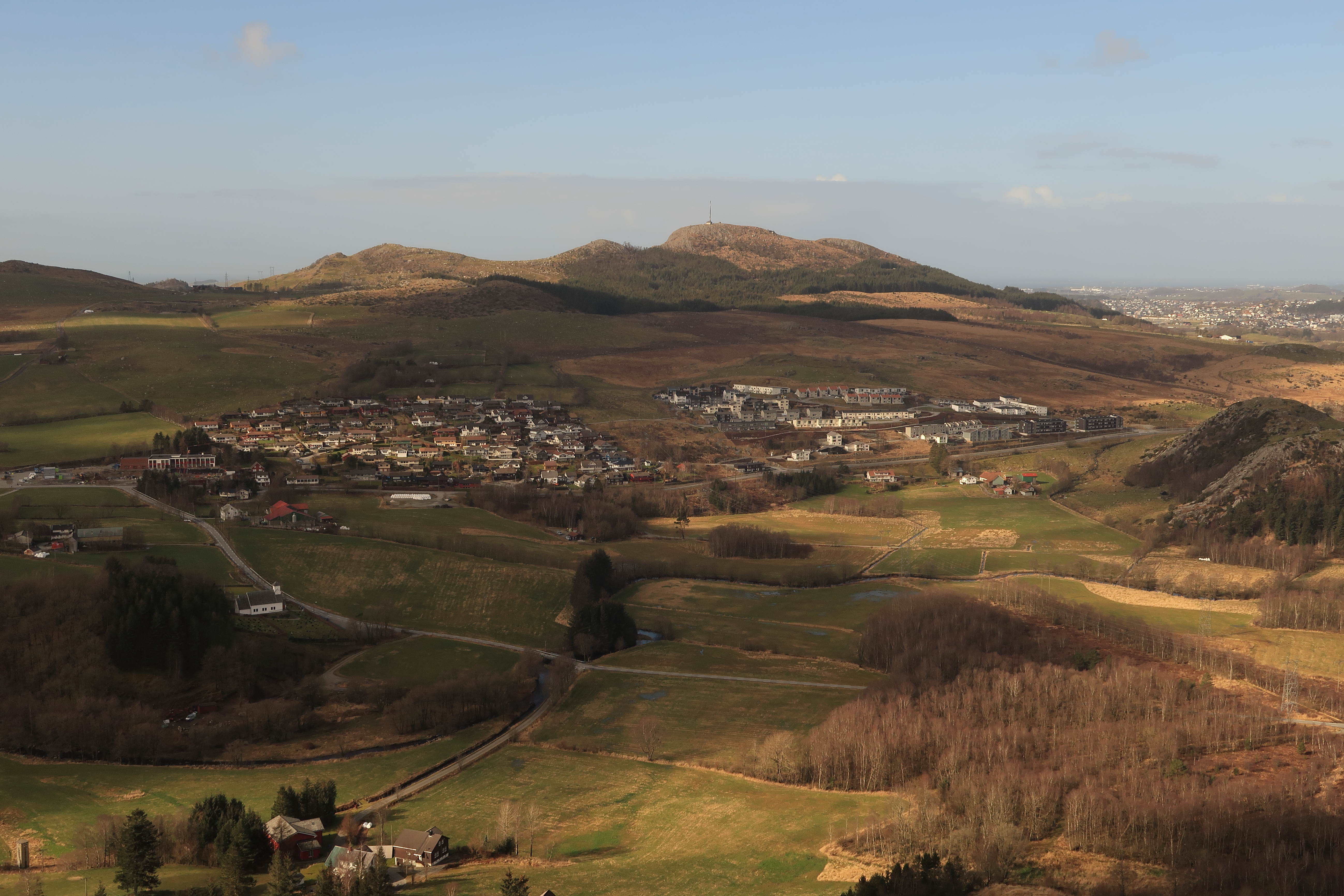 Utsikt fra Sygno vestover mot Sviland